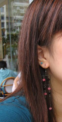 耳環